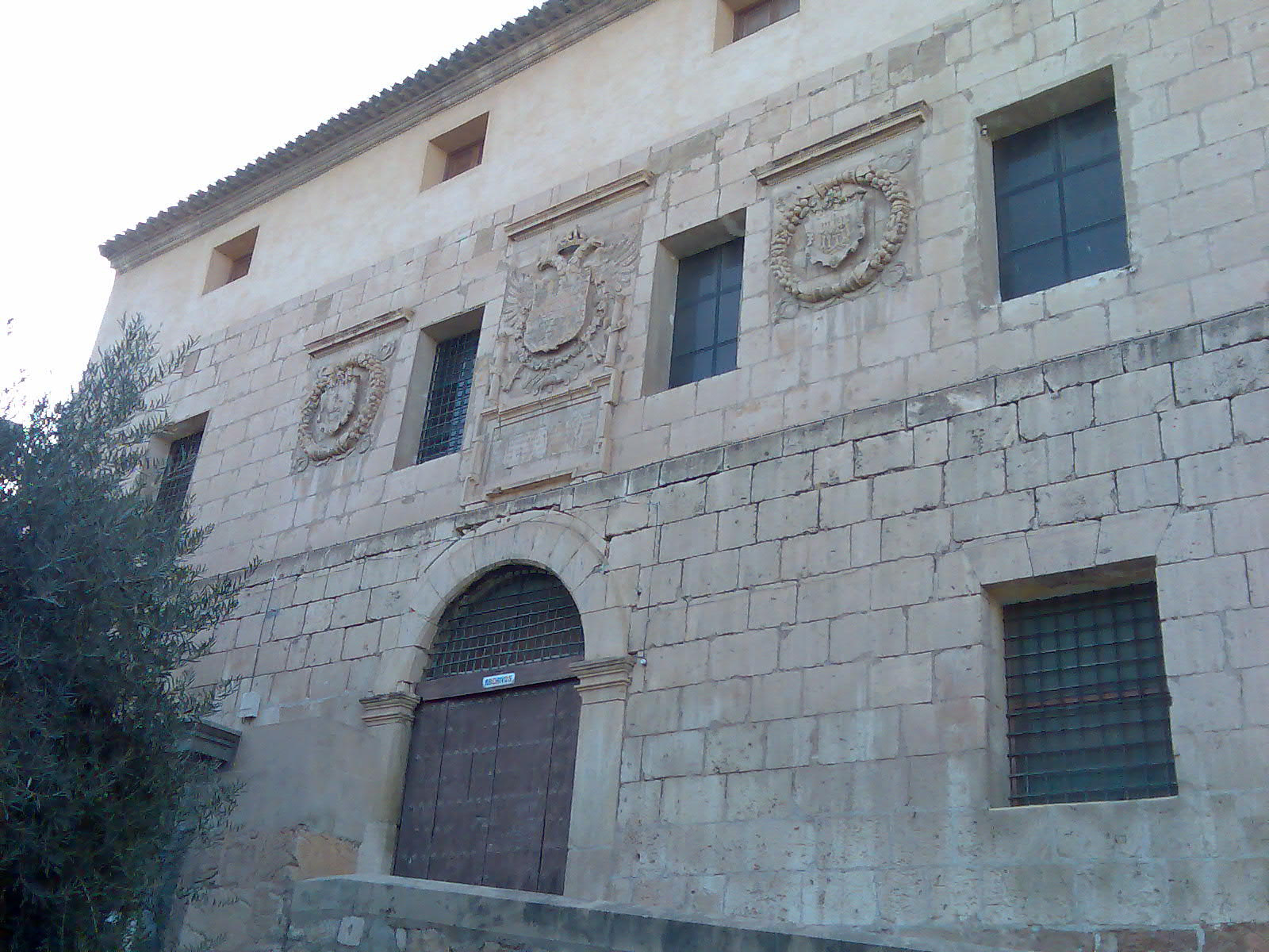 Pósito de los Panaderos de la ciudad de Lorca (Murcia)